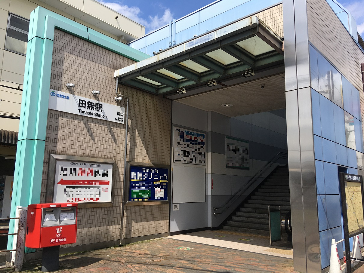 田無駅南口